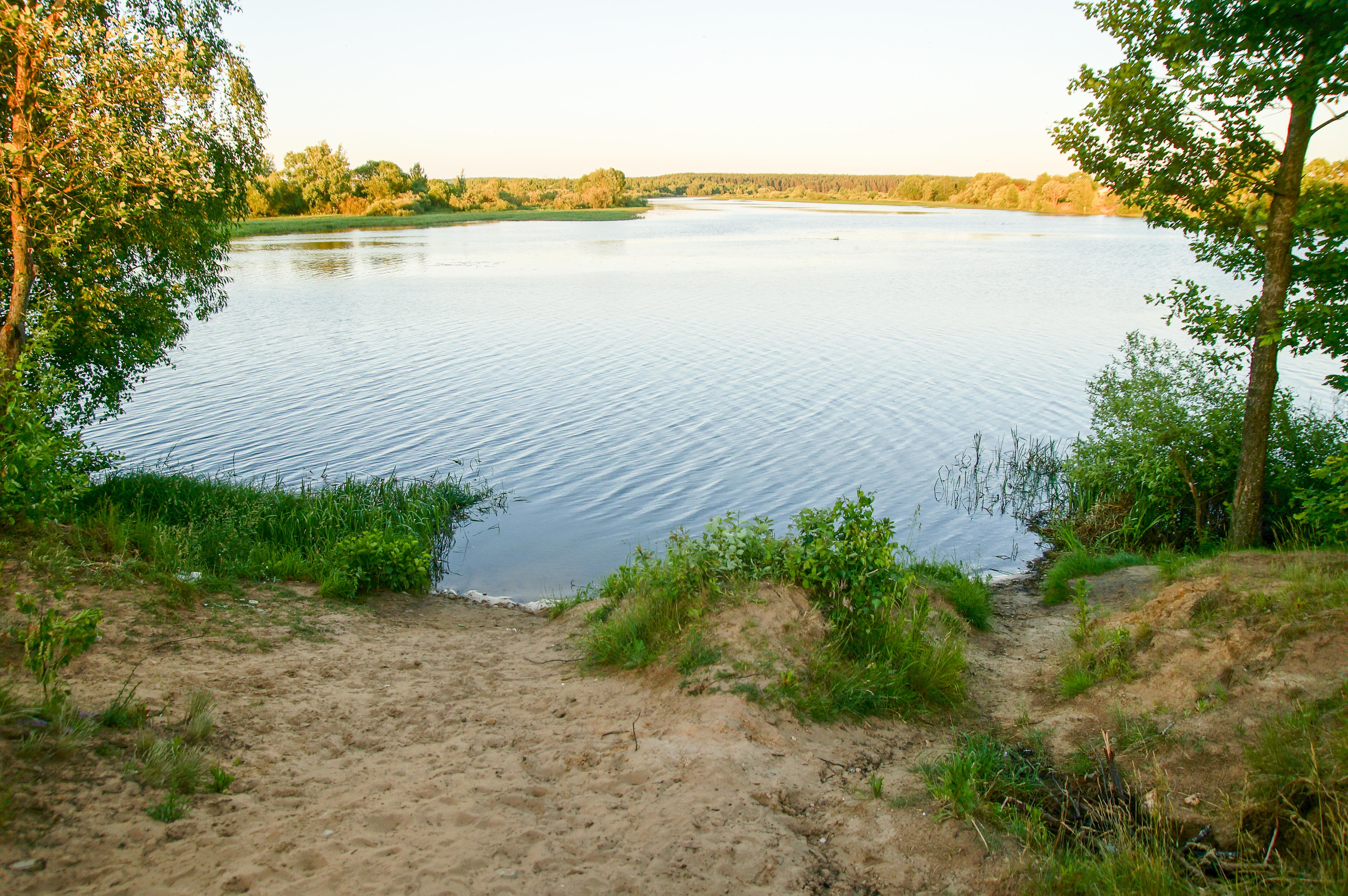 Ілія ў Ясьманаўцах